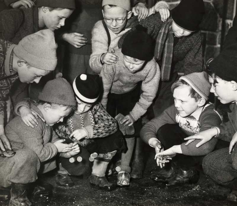 gutter, lek, kaste på stikka.